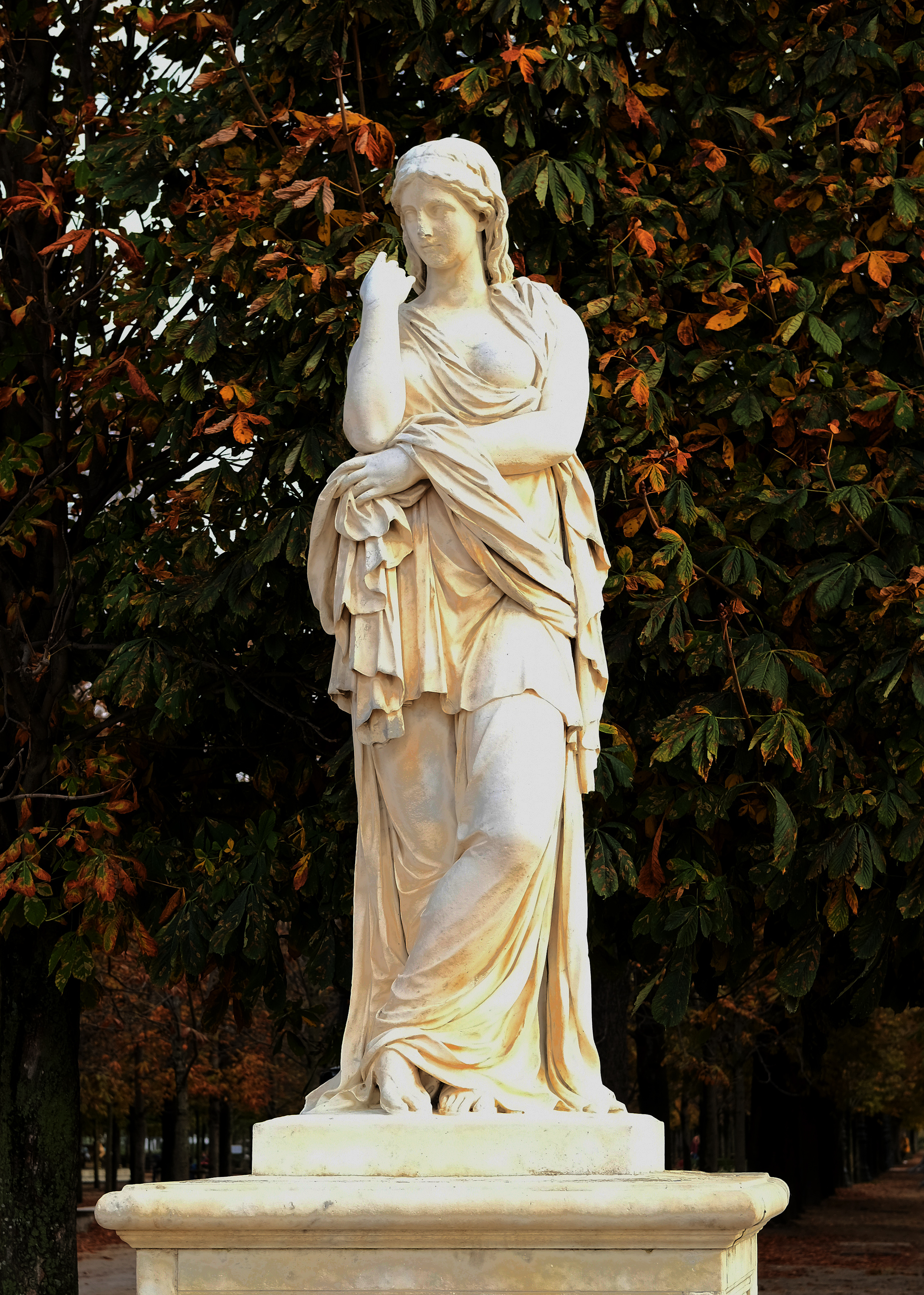 Statue "Viturie ou Le Silence ou Vestale" (marbre, 1665) de Pierre Legros le jeune exposée au jardin des Tuileries - Paris Ier